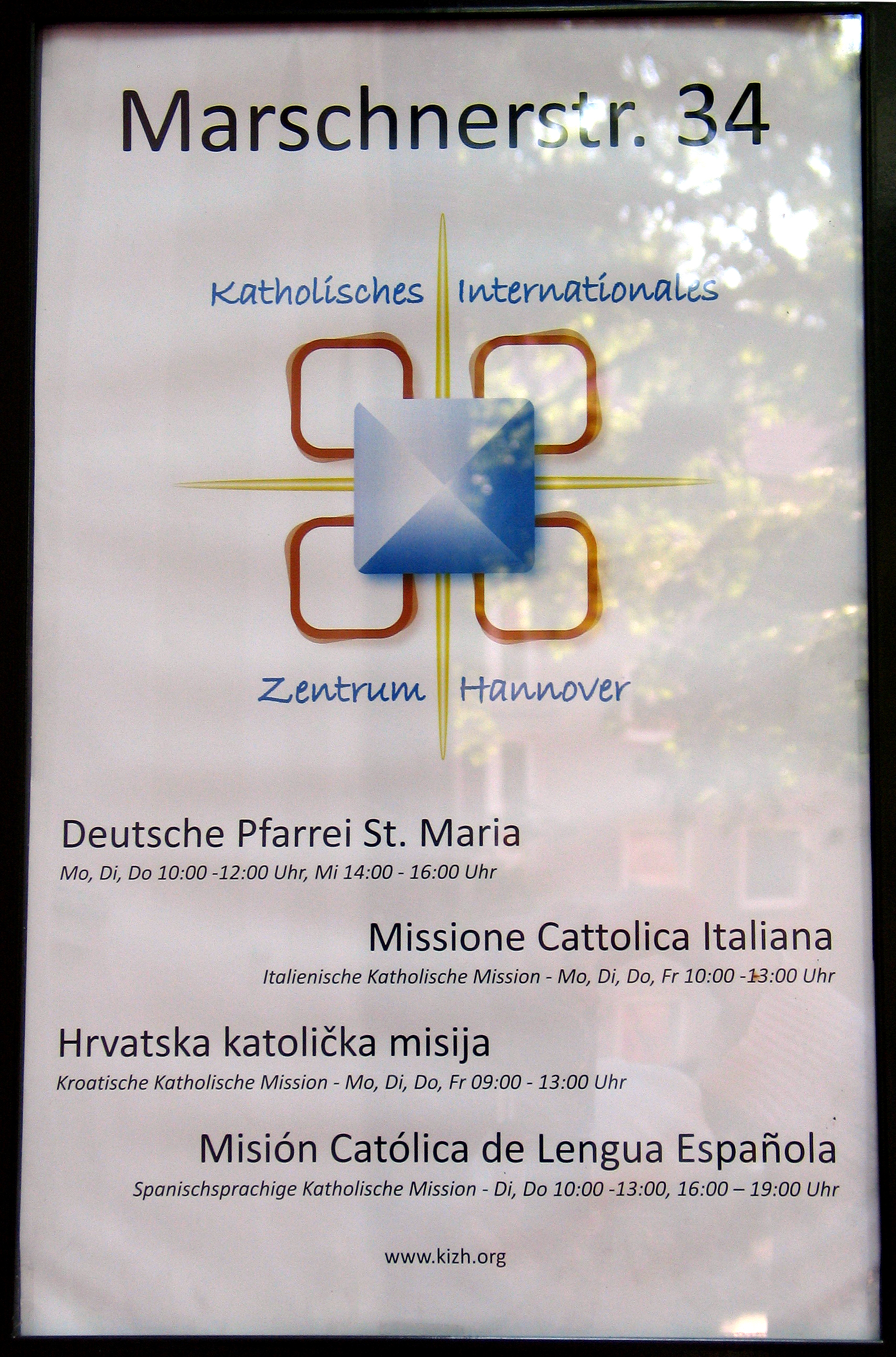 Tafel vor dem Gebäude Marschnerstraße 34 vom Katholischen Internationalen Zentrum Hannover ...